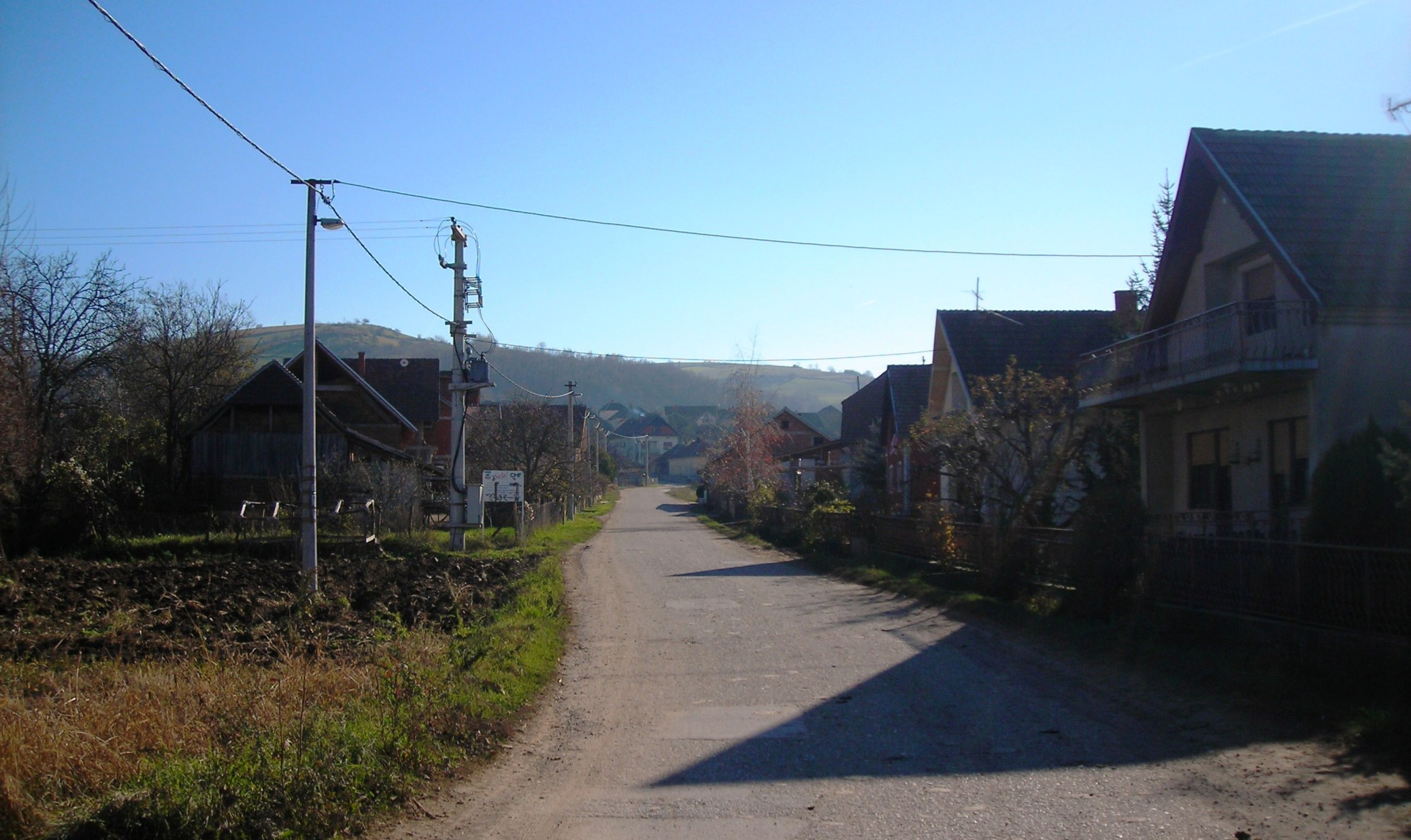 Улица у Пардику - a Street in Pardik